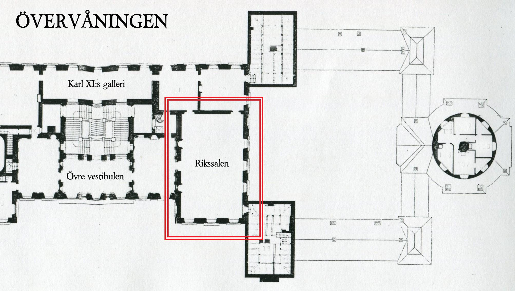 Drottningholms slott, planritning, övervåningen södra delen, Rikssalen (inom röd ram)